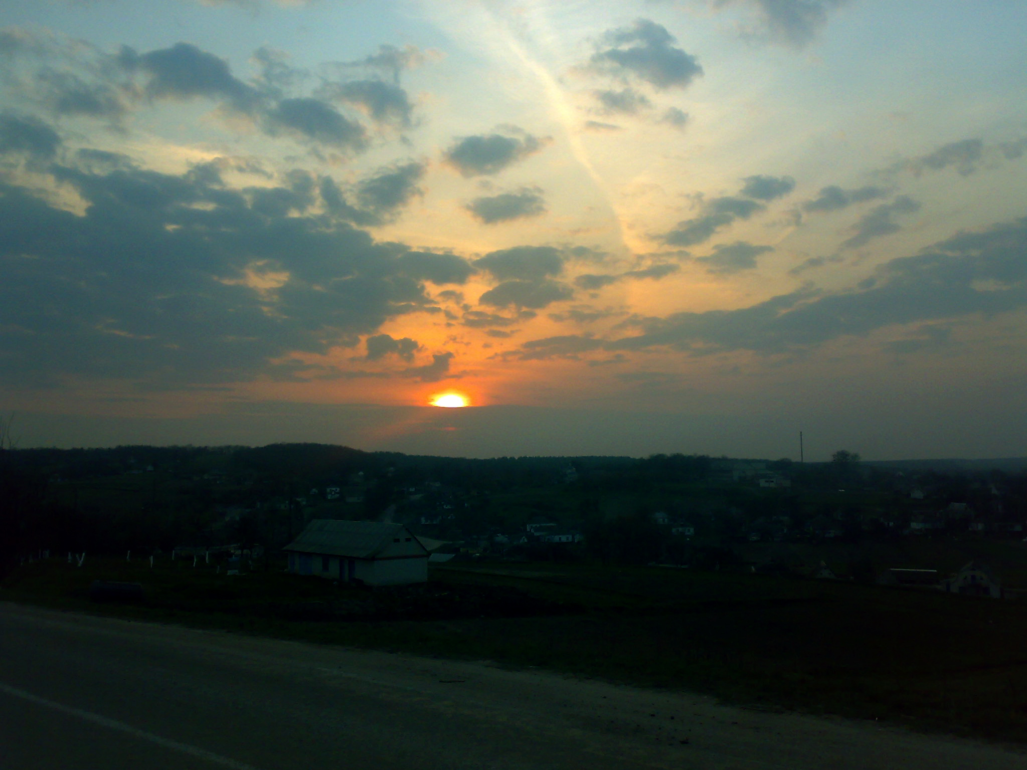 Захід сонця в Розкопанцях